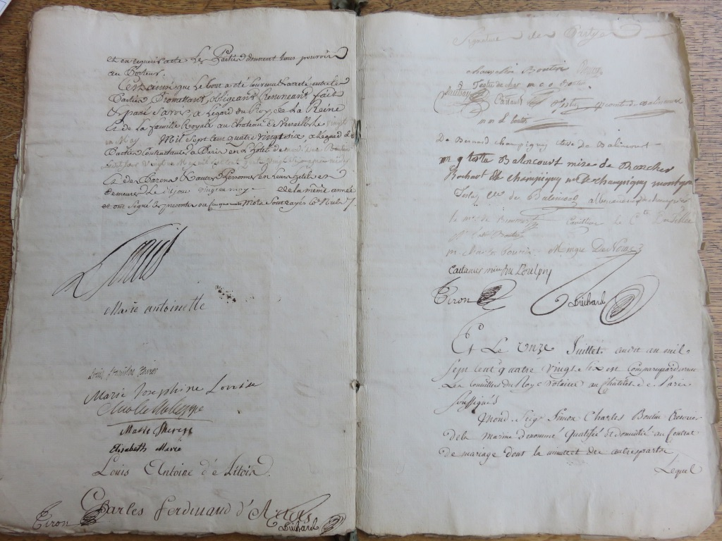 Dernières pages du contrat avec les signatures de membres de la famille royale.